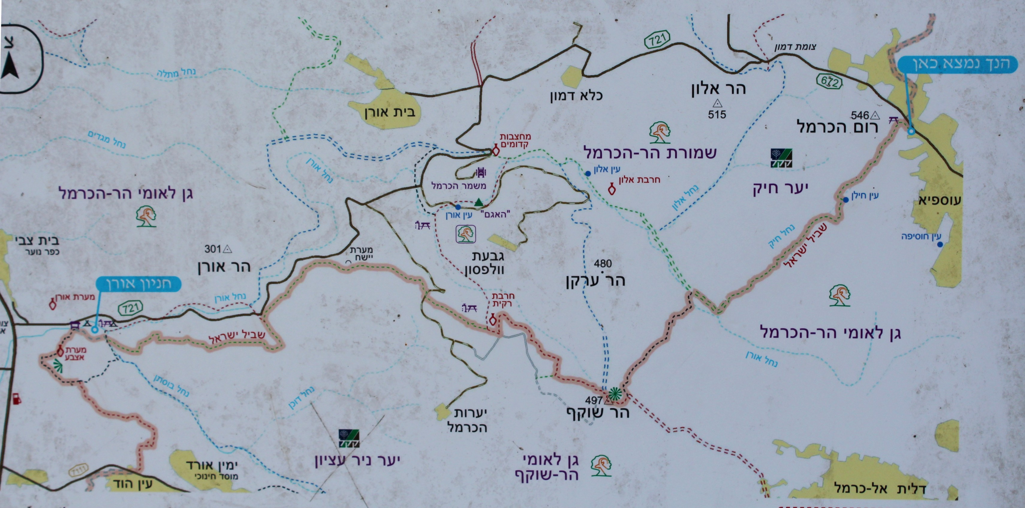 מפה של חלק מגן לאומי הר הכרמל כולל דרכים וציון אתרים